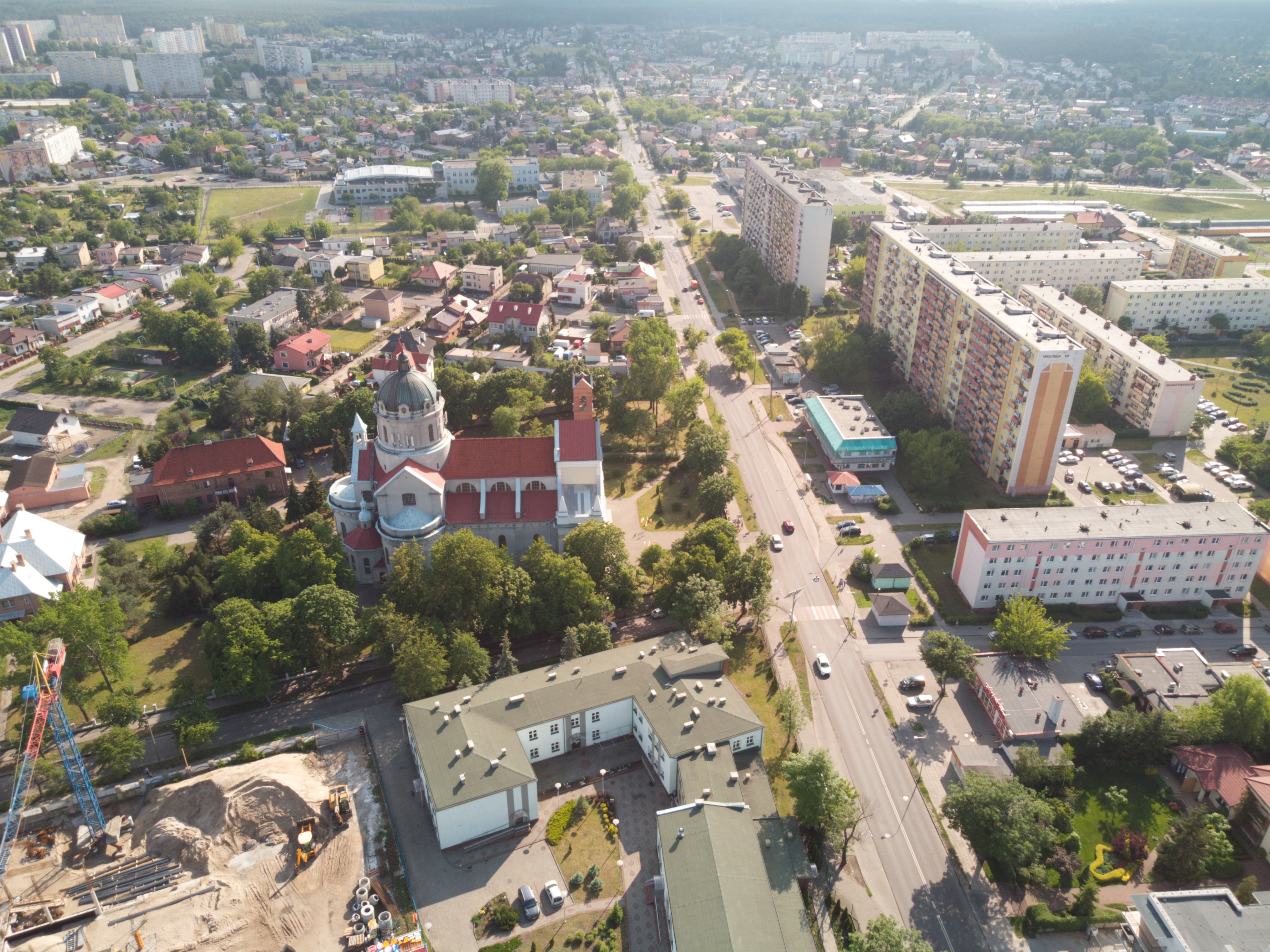 Ulica Wiejska (2020 r.)